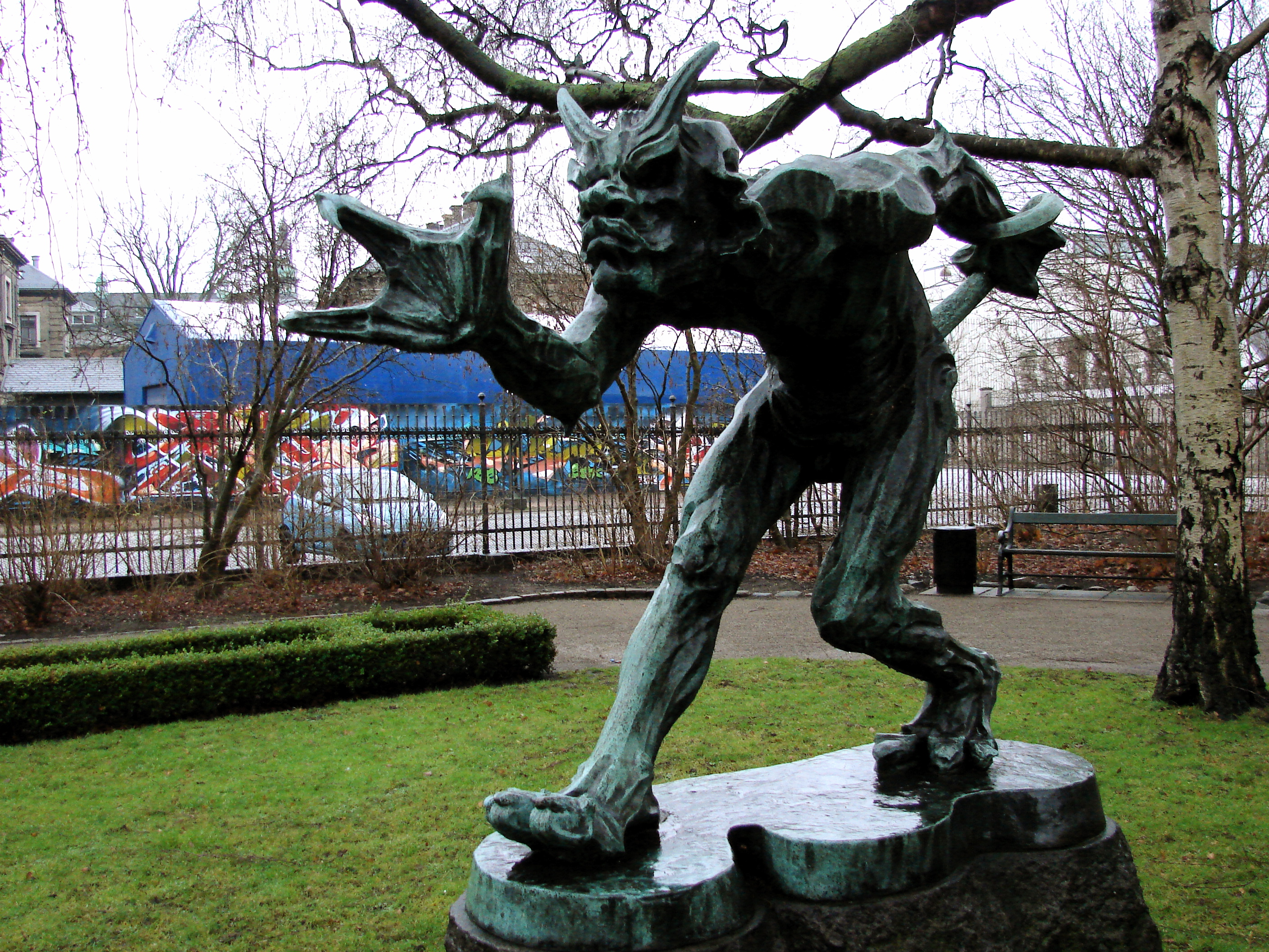 Trold der lugter Kristenblod af Niels Hansen Jacobsen (1861-1941), Glyptotekets Have, København